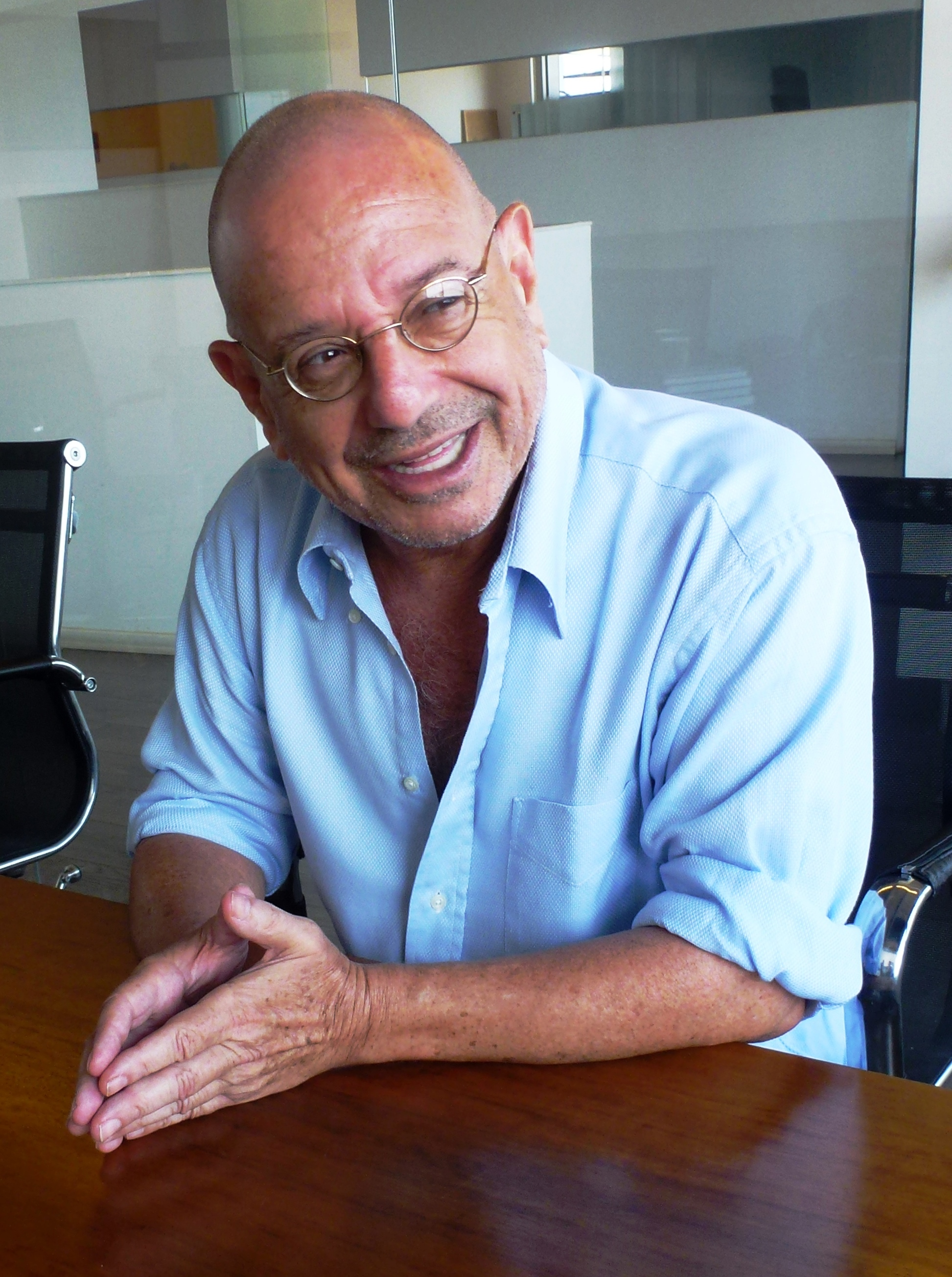 בועז אפלבאום סופר ומשורר ישראלי